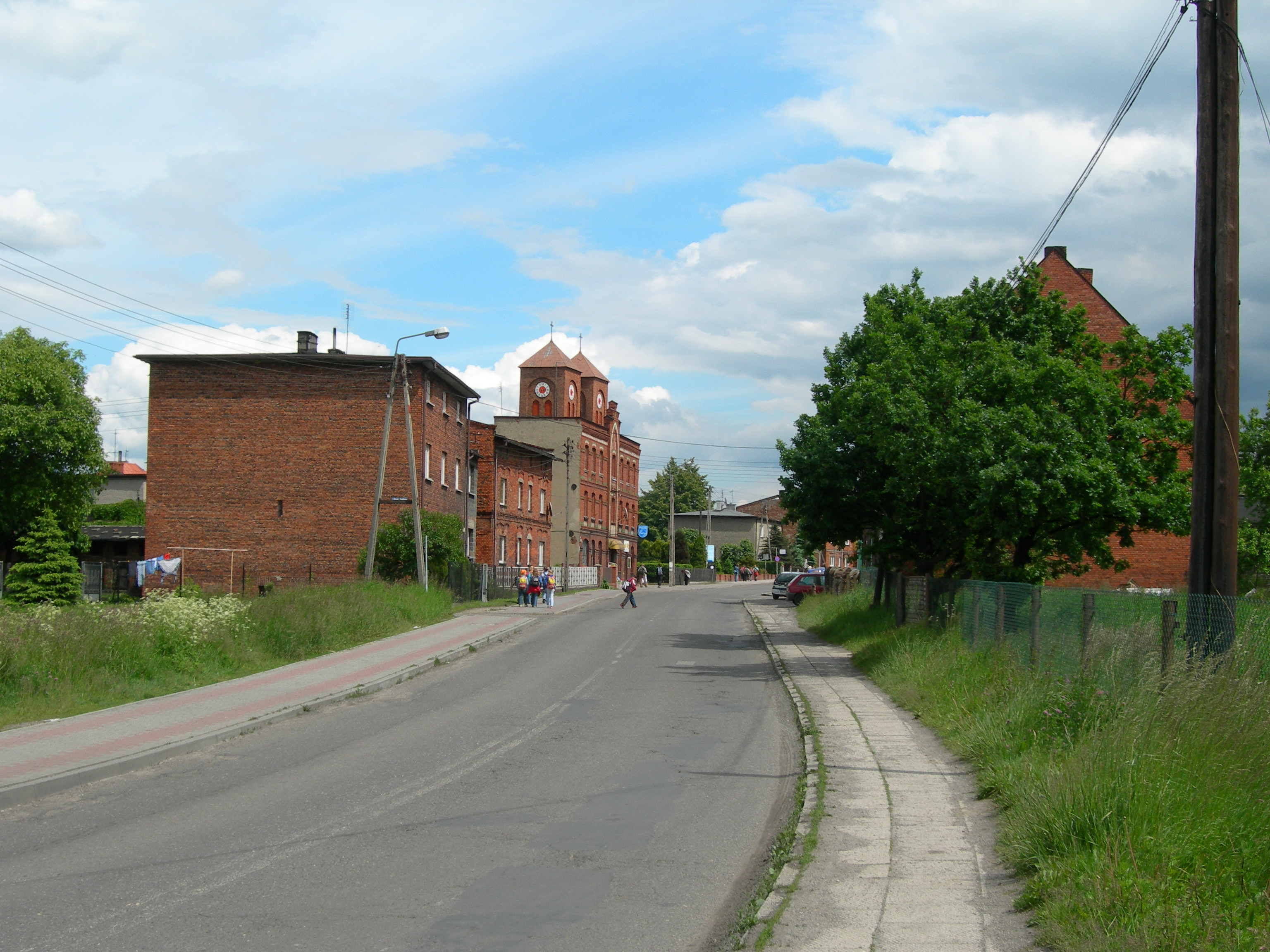 Widok na centrum Czuchowa. 2006